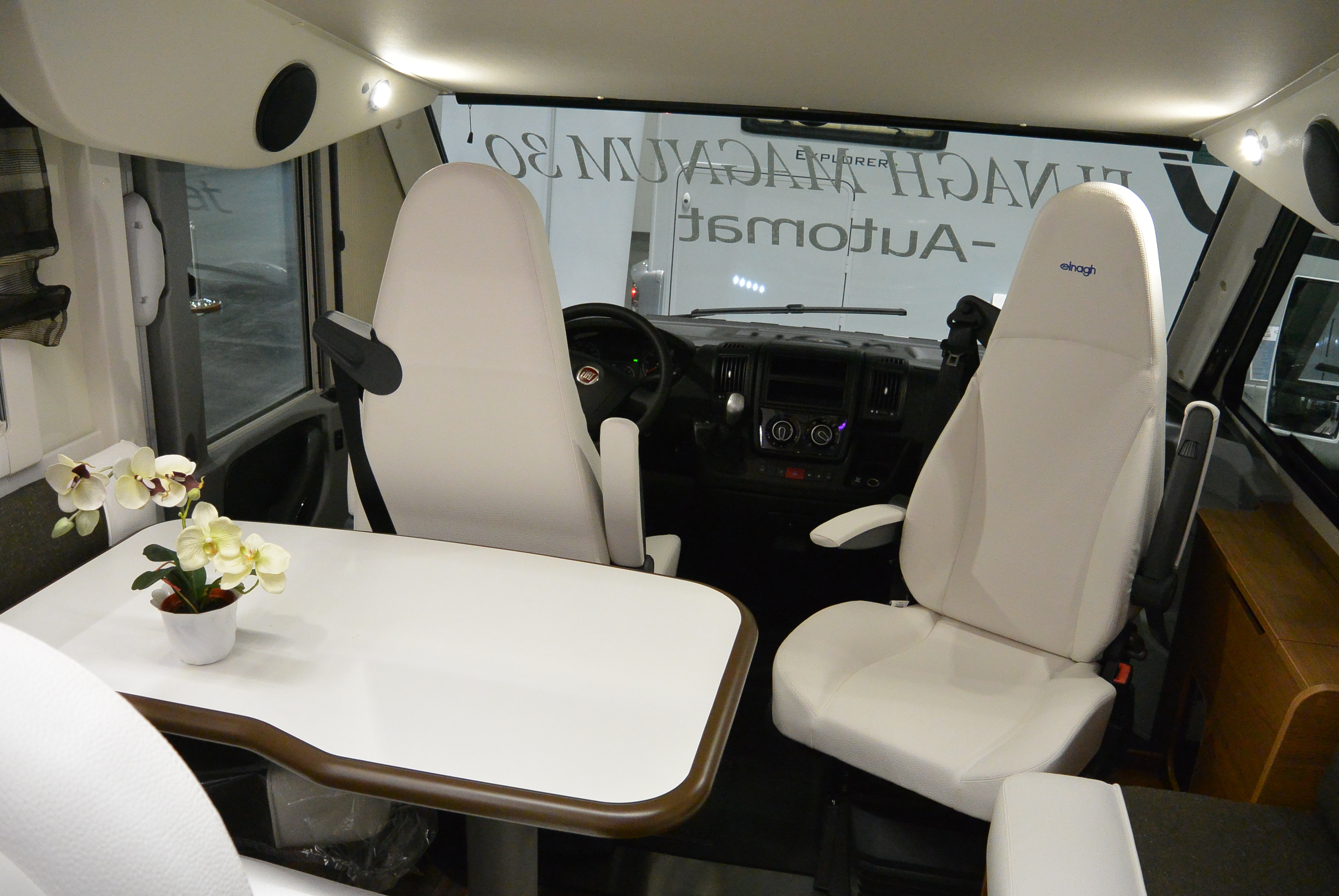 Wnętrze kampera Elnagh Magnum podczas Motor Show Poznań 2014.